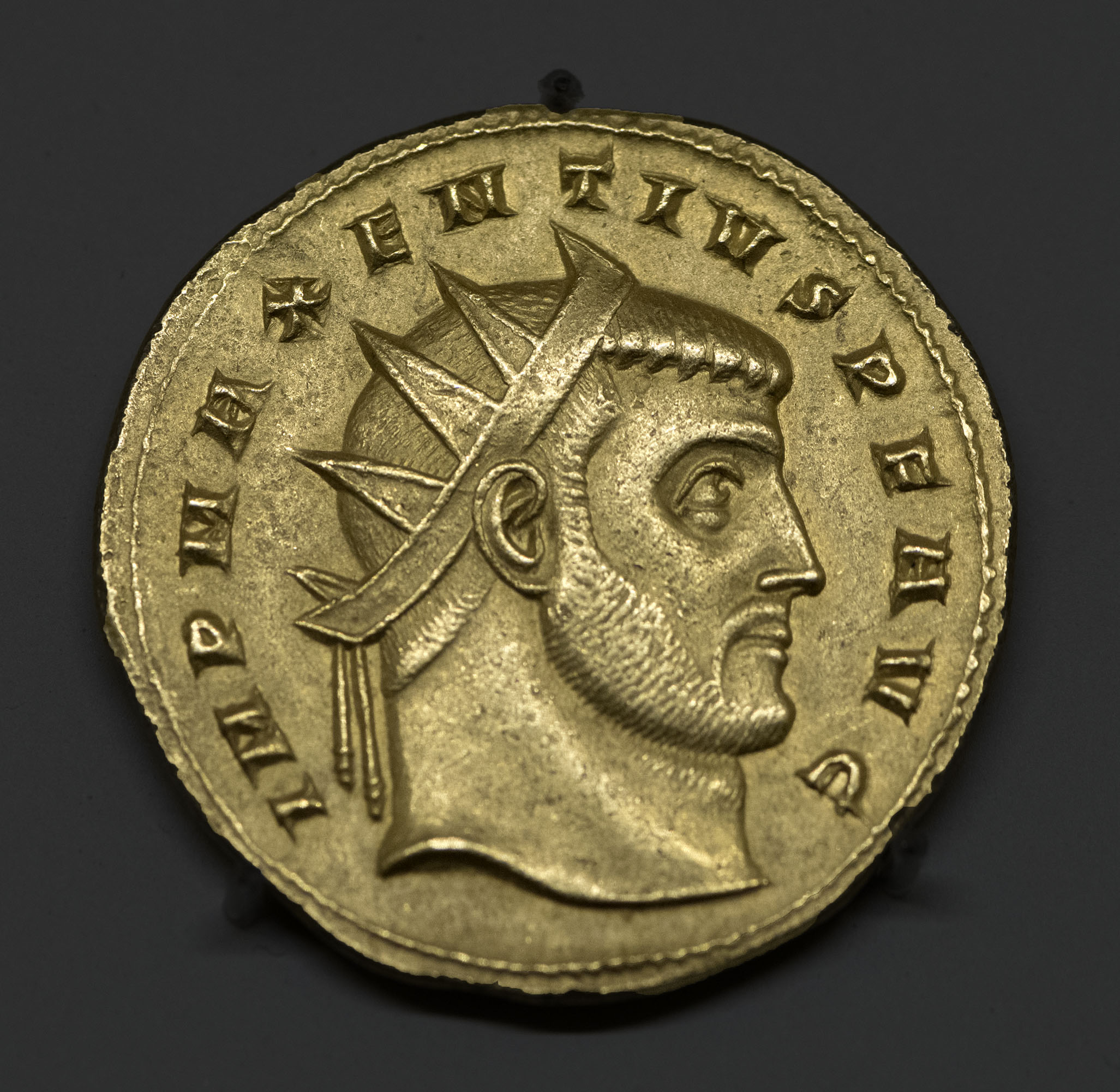 Moneda de oro del periodo 307-312, Roma. Fotografiada en el MAN. Double aureus de Maxence, 308, 10,72 g. provenant du trésor de Partinico (n°153), Numismatica Ars Classica, Zurich, n°139, vente du 26 octobre 2005.